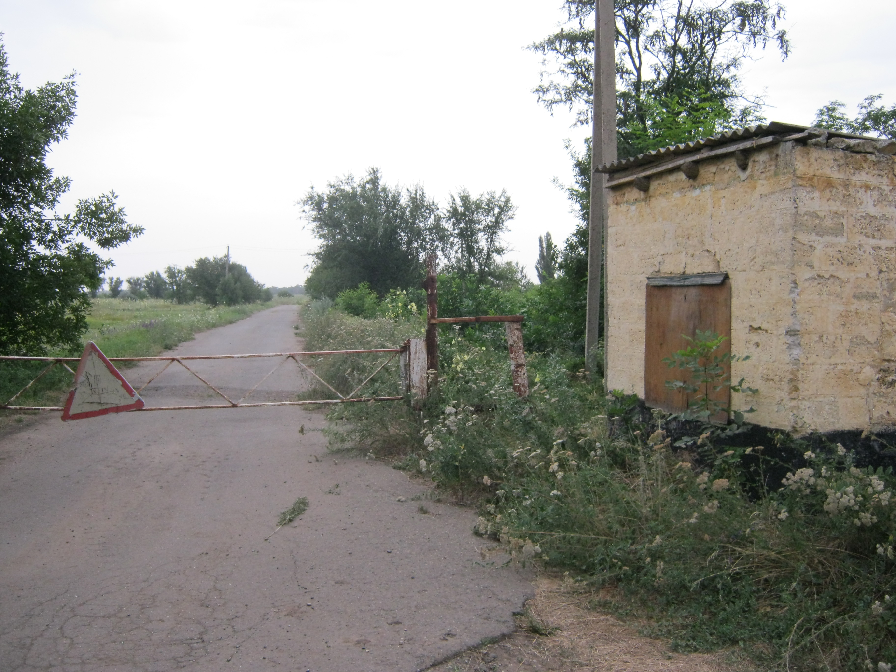 Контрольно пропускной пункт на заброшенном аэродроме Светлоград